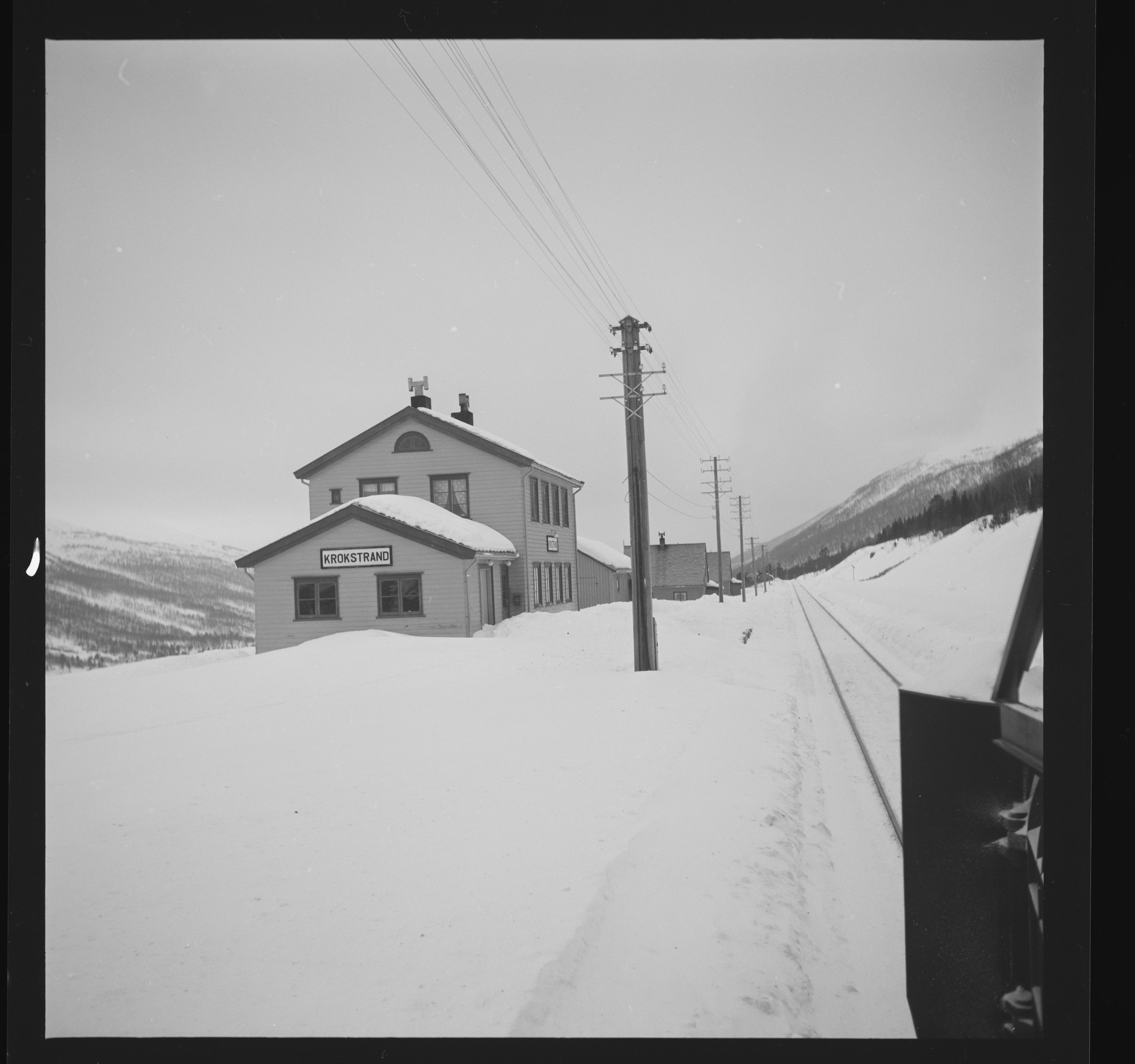 Bildet er hentet fra Nasjonalbibliotekets bildesamling Krokstrand, Rana, Nordland